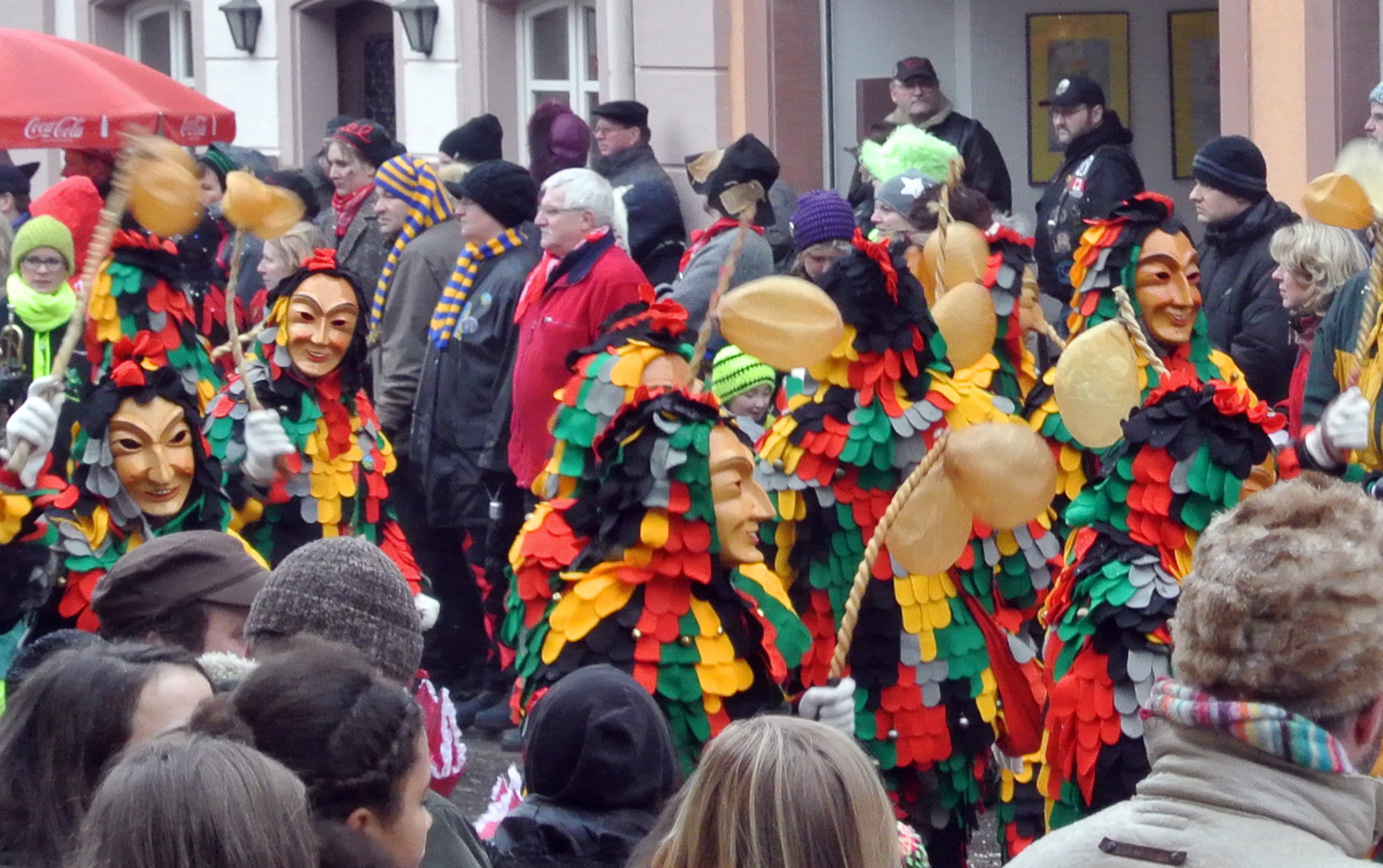 Spättlehansele der Offenburger Hexenzunft e.V. beim Jubiläumsumzug 150 Jahre Narrenzunft Krakeelia Waldkirch e.V. am 01.02.2015